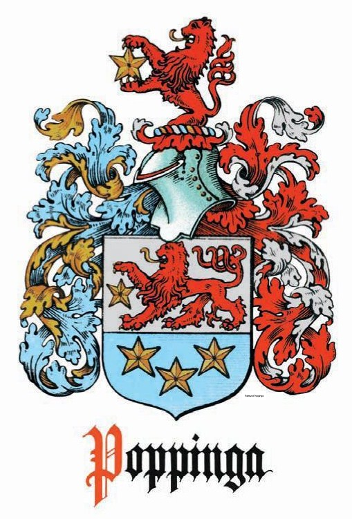 Wappen der ostfriesischen Familie Poppinga aus Marienhafe, belegt seit 1671